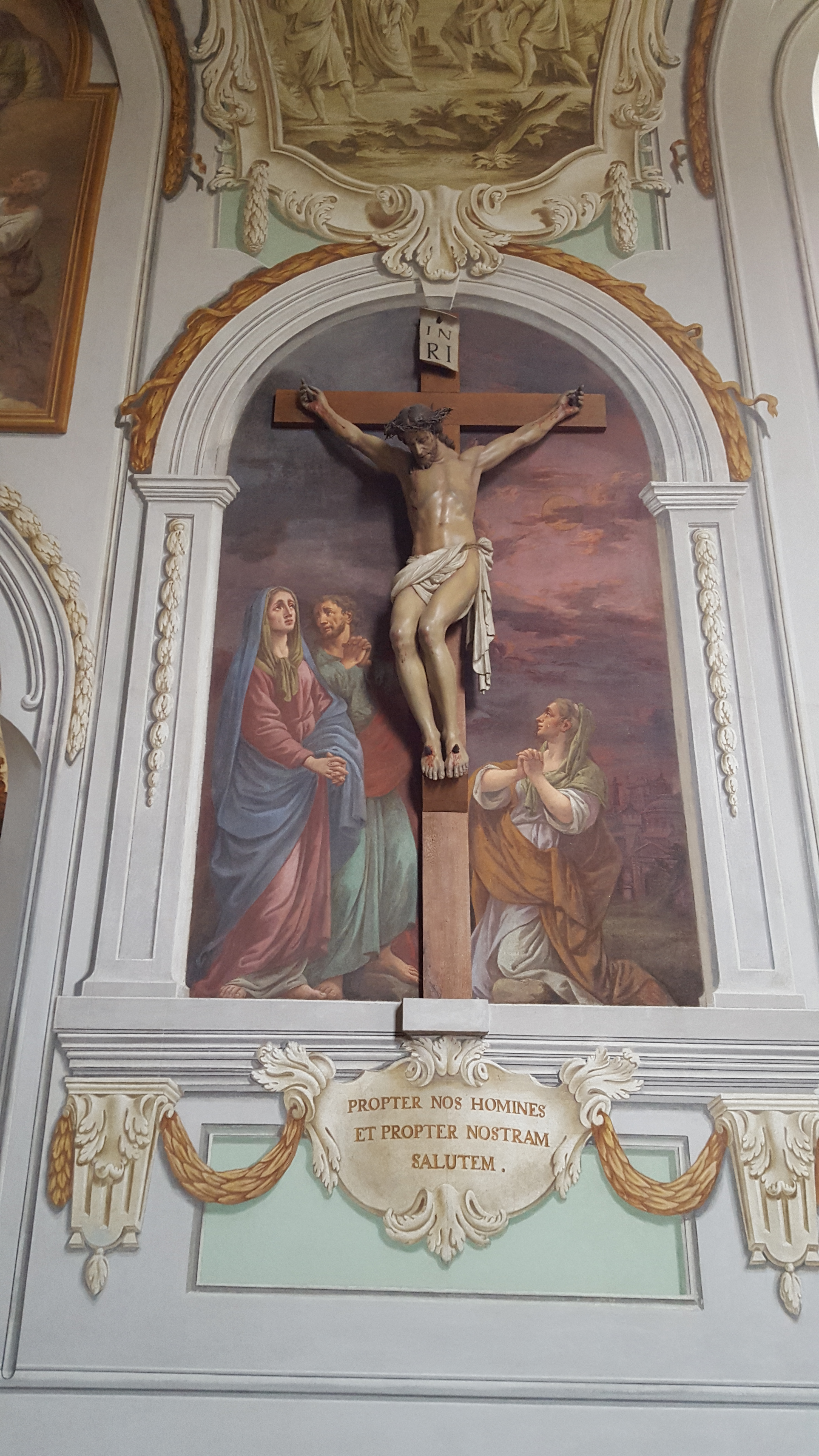 Kruzifix mit Fresko am rechten Langhaus von St. Jakobus der Ältere in Hörgertshausen